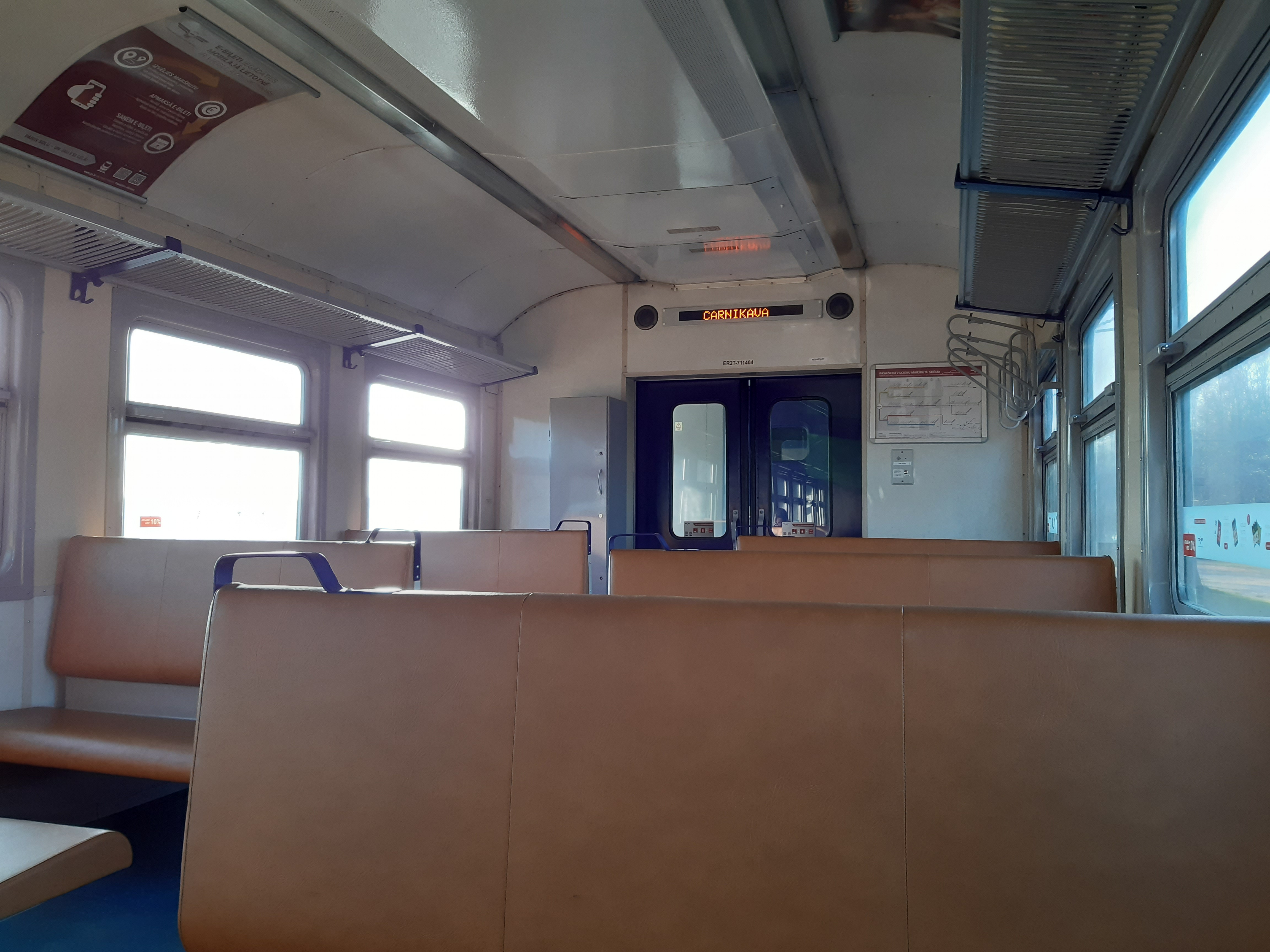 Elektrovilciena ER2T interjers (maršruts Carnikava-Rīga).